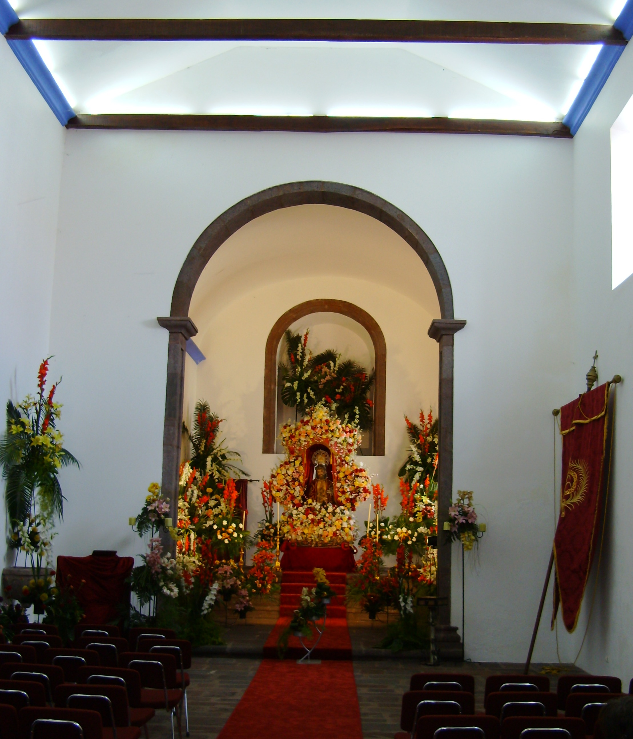 Igreja de Nossa Senhora da Vitória, Vila do Porto, Ilha de Santa Maria (Açores), Portugal.